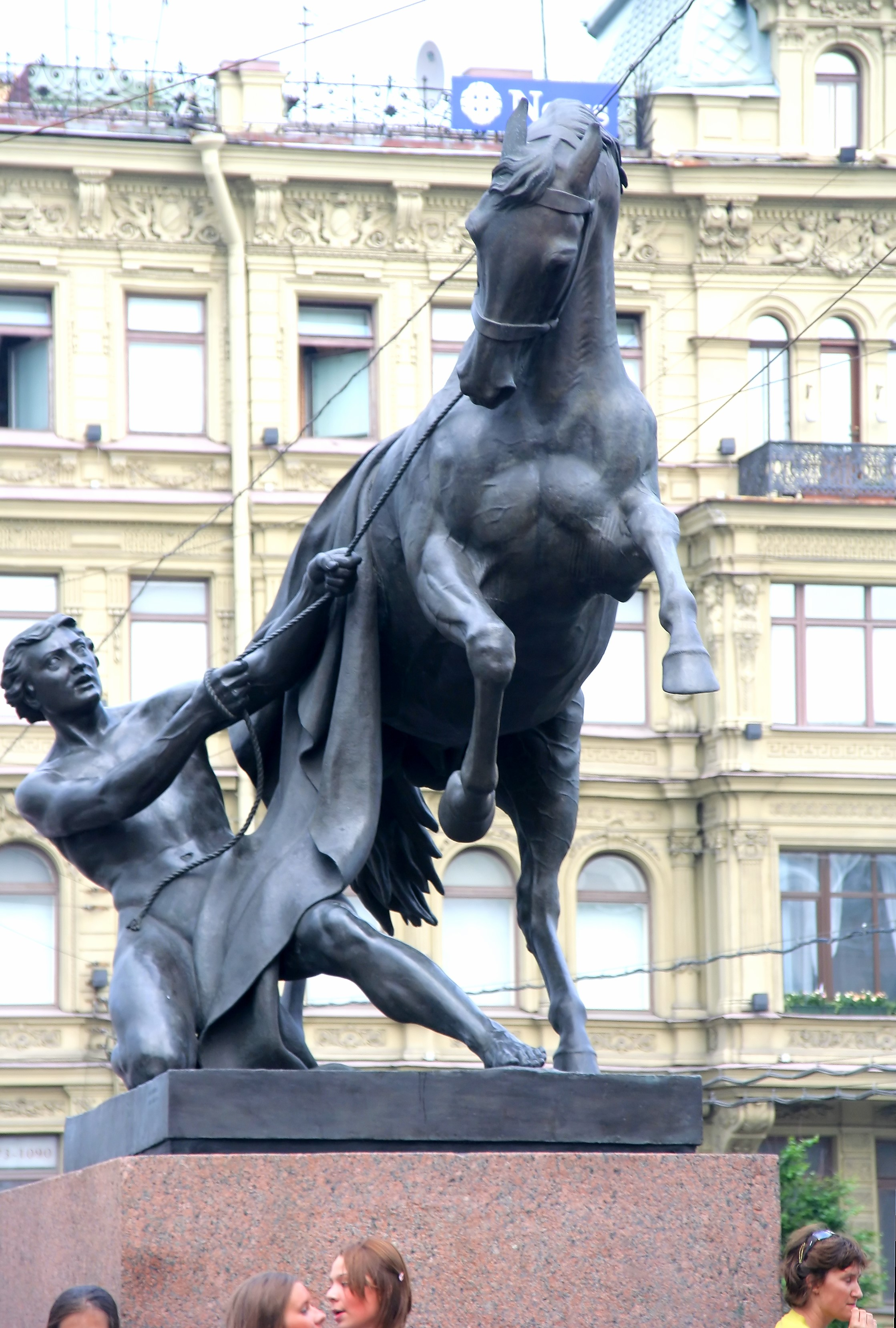 Четвёртая композиция.